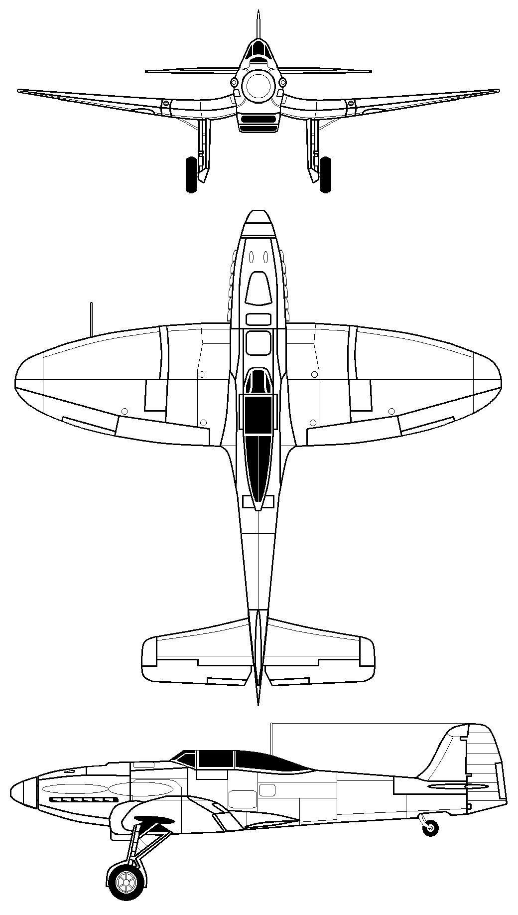 3-Seiten-Ansicht der He 112 B-Serie